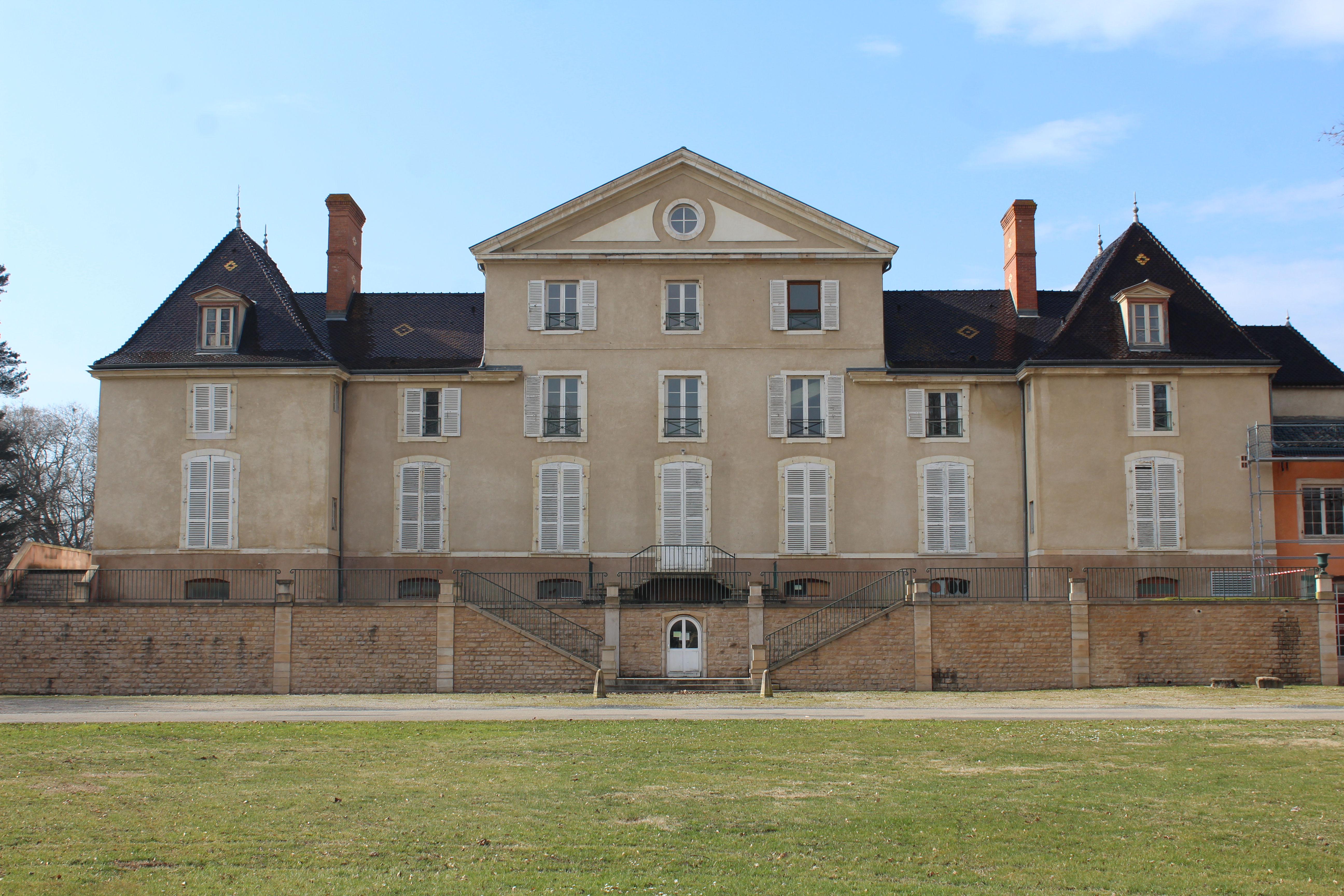 Château de Pont-de-Veyle.